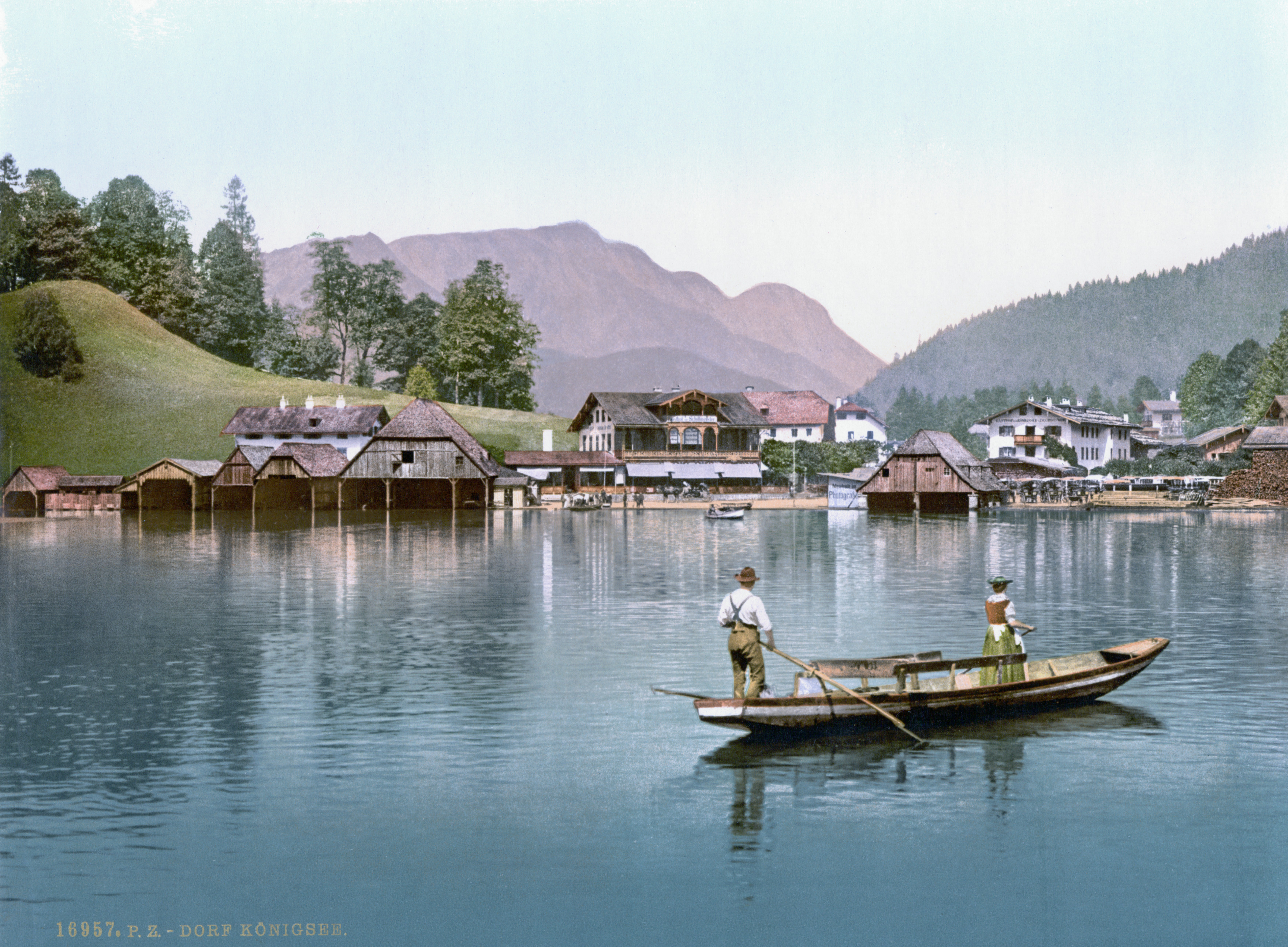 Königssee um 1900